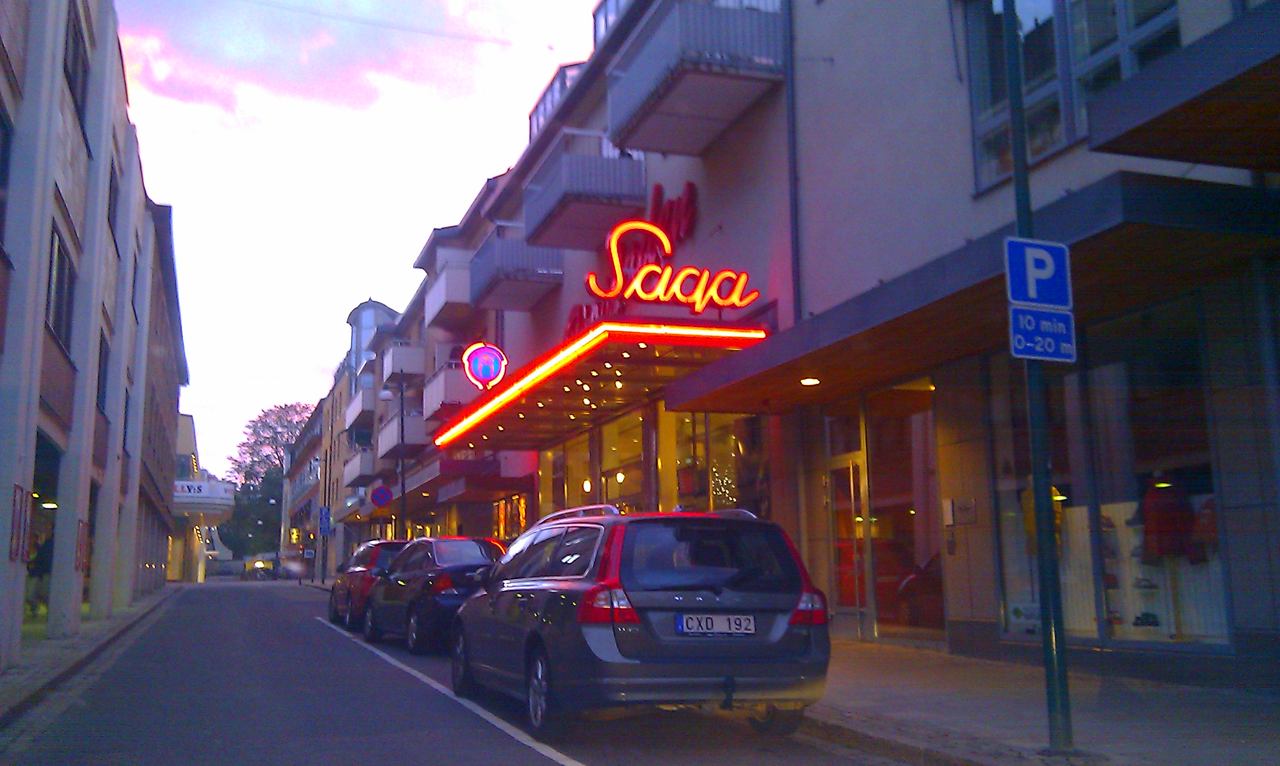 Biografen Saga i Skövde